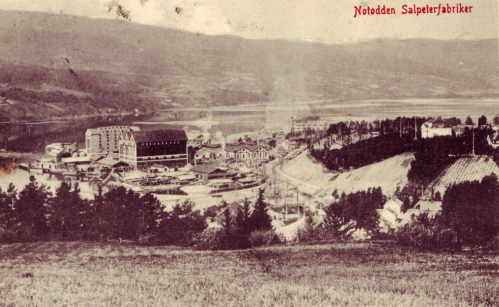 Фабрика по производству селитры в Нутоддене